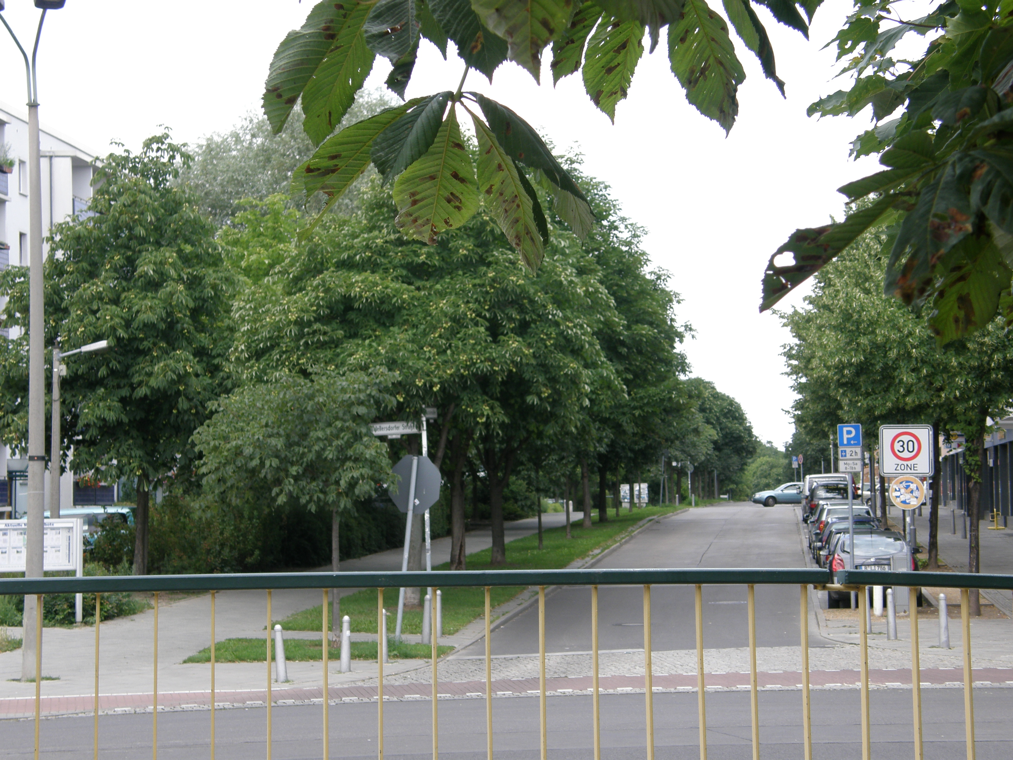 Berlin-Hellersdorf, Kastanienallee